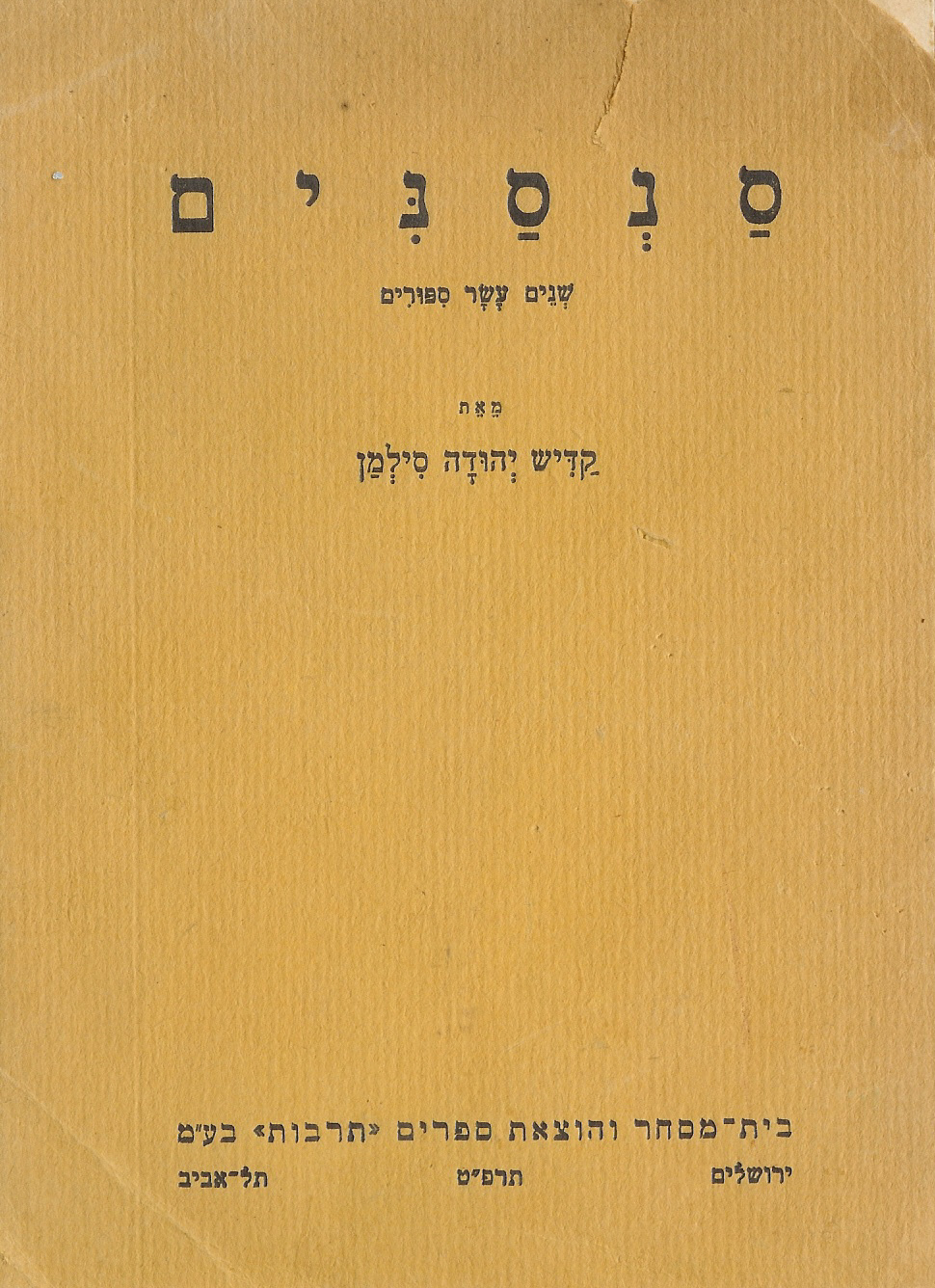 עטיפת הספר 'סנסנים' מאת קדיש יהודה סילמן